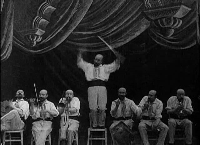 Méliès, L'homme-orchestre (Star Film 262-263, 1900) 02